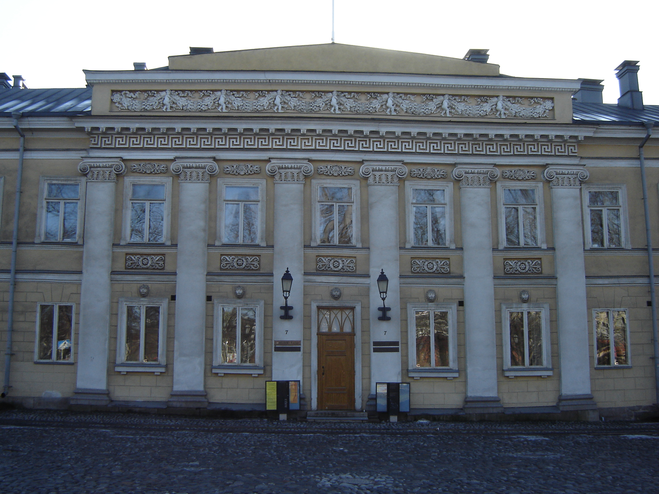 Hjeltintalo Vanhalla Suurtorilla